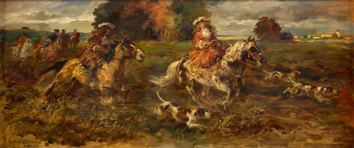 Ausritt zur Jagd. Signiert. Öl auf Leinwand, 30 × 62 cm